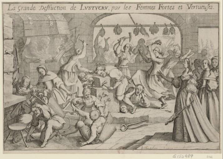 La Grande destruction de Lustucru par les femmes fortes et vertueuses. Estampe de Sébastien Leclerc (1637-1714). "Ceci est une espèce de réparation que Le Clerc se crut obligé de faire aux dames qu'il avait comme insulté dans l'estampe qu'on vient de décrire [(A l'enseigne tout est bon. Céans; maître Lustucru, opérateur céphalique, a un secret admirable pour reforger et repolir les têtes des femmes acariâtres, bigeardes, criardes, diablesses, enragées, fantasques, glorieuses, hargneuses, insupportables, lunatiques, méchantes, etc.)]. On voit ici la tête du pauvre opérateur encéphalique le marteau encore à la main, mise sur l'enclume par une femme qui la tient par les cheveux et qui frappe dessus à grands coups de marteau, ainsi qu'une de ses camarades. Une autre lui donne un grand coup de pied dans le derrière, et frappe un des forgerons renversé par terre, avec un trousseau de clés. Un homme chargé de têtes de femmes est assommé à coups de bâton, une autre femme terrasse un hotteur à coups de poing. Une multitude de femmes, la quenouille à la main, accourt pour soutenir leurs amies. Dans le fond plusieurs femmes, retrouvant en chemin leur tête pendue à la boutique de l'opérateur, la décrochent et la remettent sur les épaules." (Charles Antoine Jombert, Catalogue raisonné de l'oeuvre de Sébastien Le Clerc, Paris, 1774, vol. 1, p. 57)